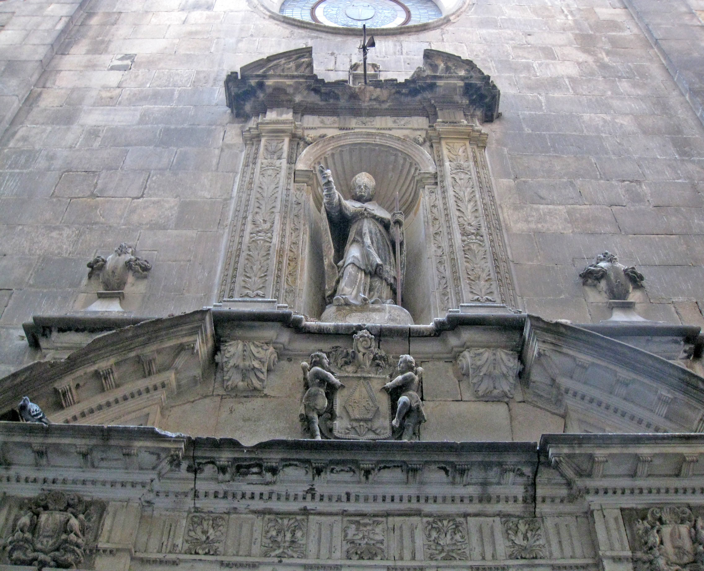 Església de Sant Sever (segles XVII-XVIII), al barri Gòtic de Barcelona, vora la Catedral. Detall de la façana barroca, amb una fornícula amb la imatge del sant titular.